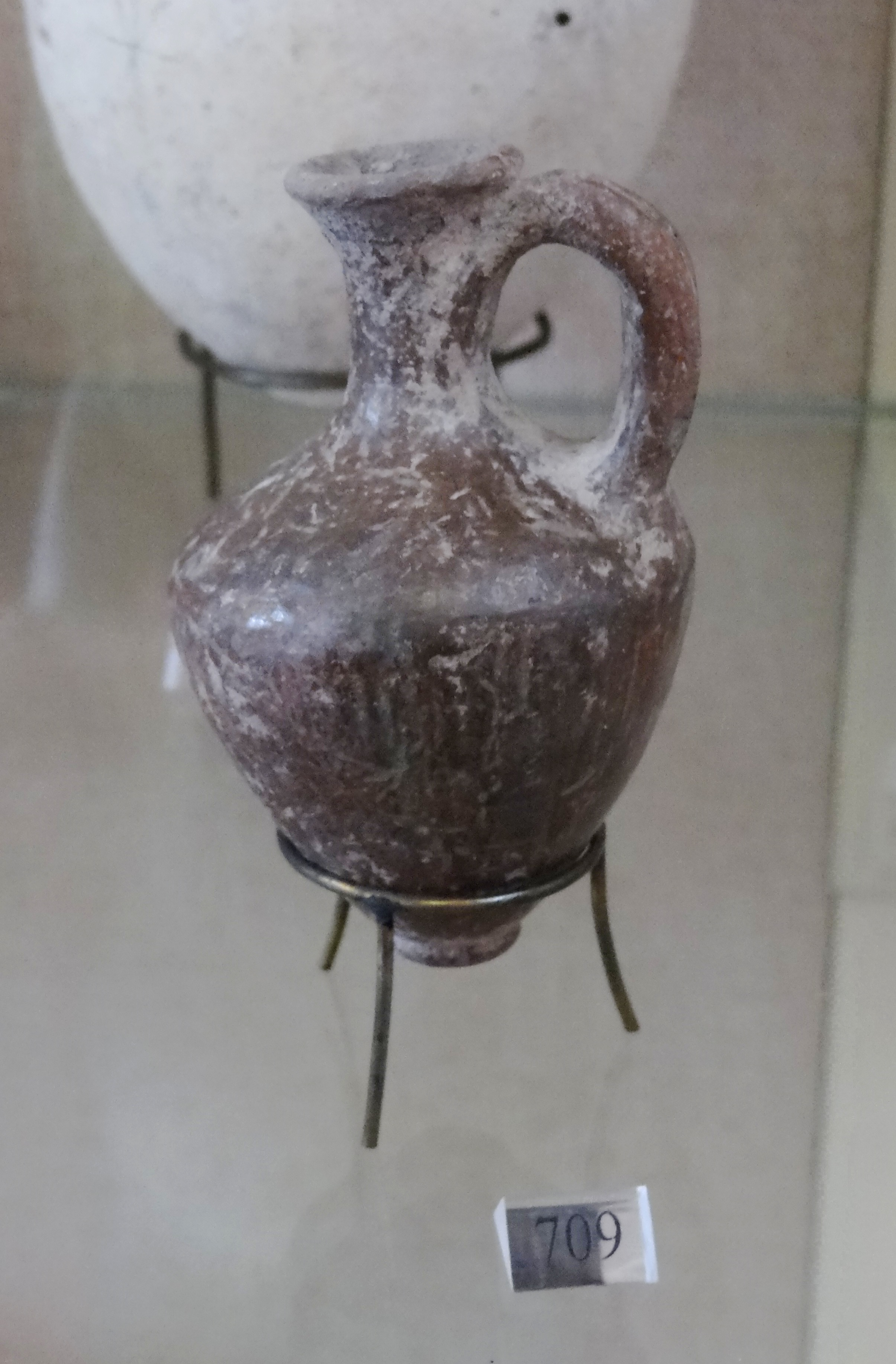 Tell el-Yehudiyeh ware Juglet.. Rockefeller Museum כלי תל אל יהודיה הינה קבוצת כלי קרמיקה ייחודית מתקופת הברונזה התיכונה II מוזיאון רוקפלר פכיות